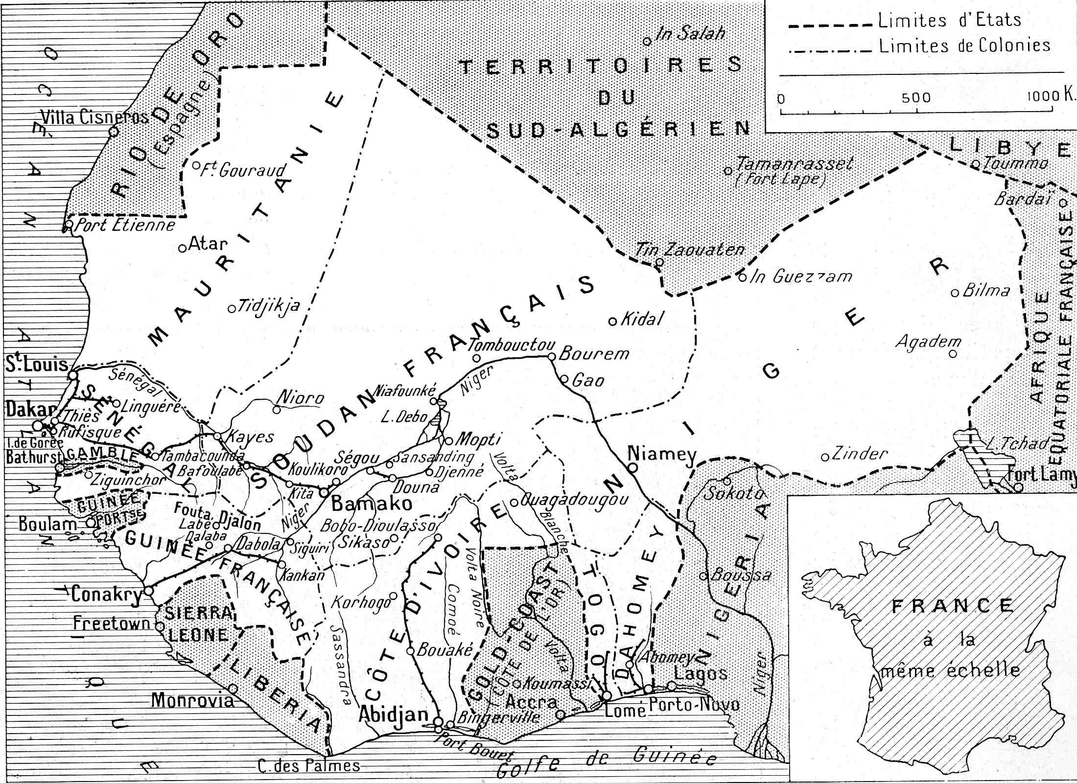 Carte de l'AOF ("Les sept colonies qui composent l'Afrique occidentale française" in L'oeuvre de la France en Afrique occidentale, numéro spécial de L'Illustration, 29 février 1936, p. 261)